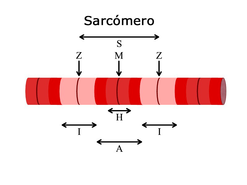 Estructura de una miofibrilla en la que puede apreciarse la unidad básica de contraccion muscular o sarcómero.